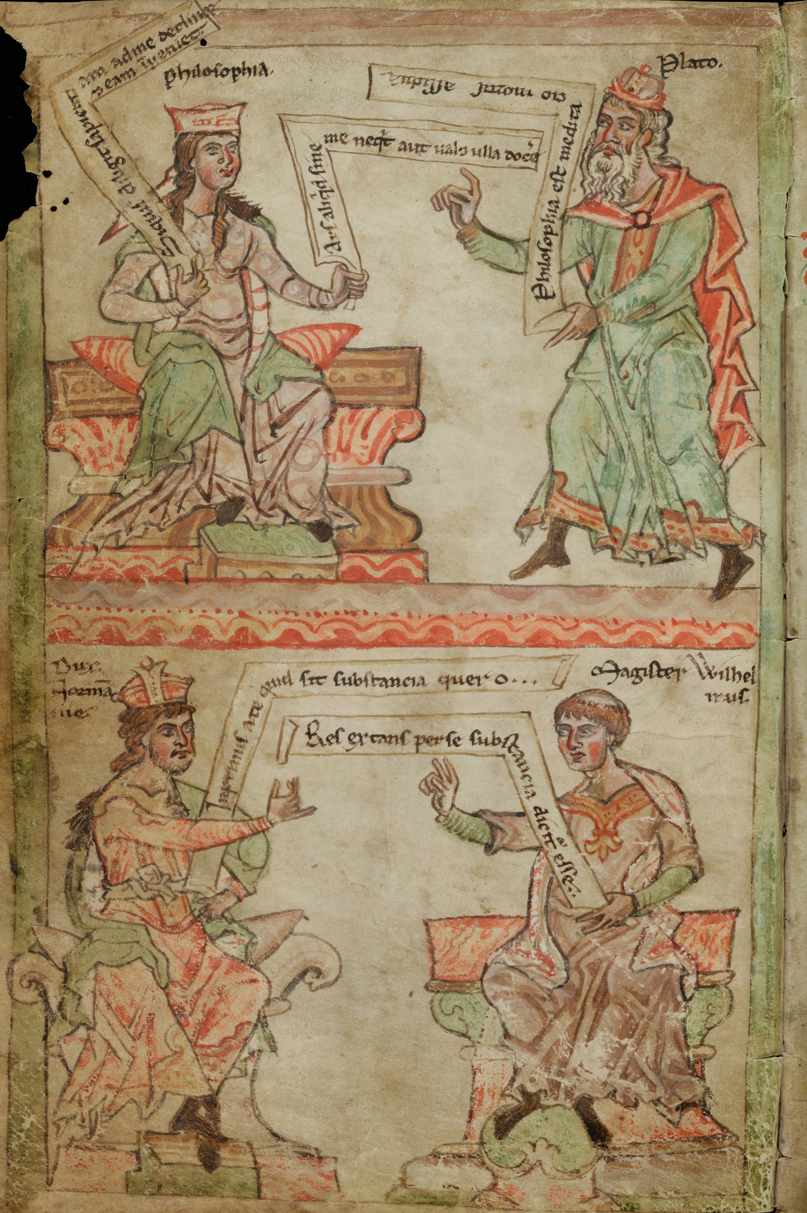 Frontispiz einer Handschrift des Dragmaticon von Wilhelm von Conches, Cologny-Genf, Bibliotheca Bodmeriana, Cod. Bodmer 188 (frühes 13. Jh.). Dargestellt sind Platon (oben rechts) im Gespräch mit der personifizierten Philosophie (oben links) sowie Wilhelm von Conches (unten rechts) mit Gottfried Plantagenet (unten links).